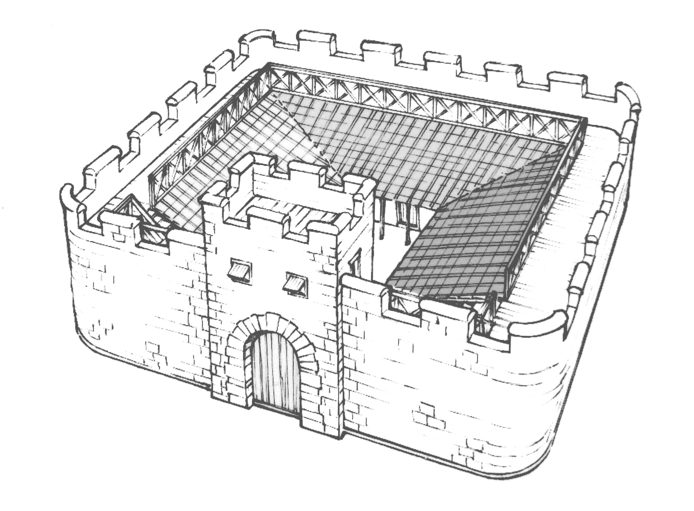 Rekonstruktion des Kleinkastells Seitzenbuche am Odenwaldlimes